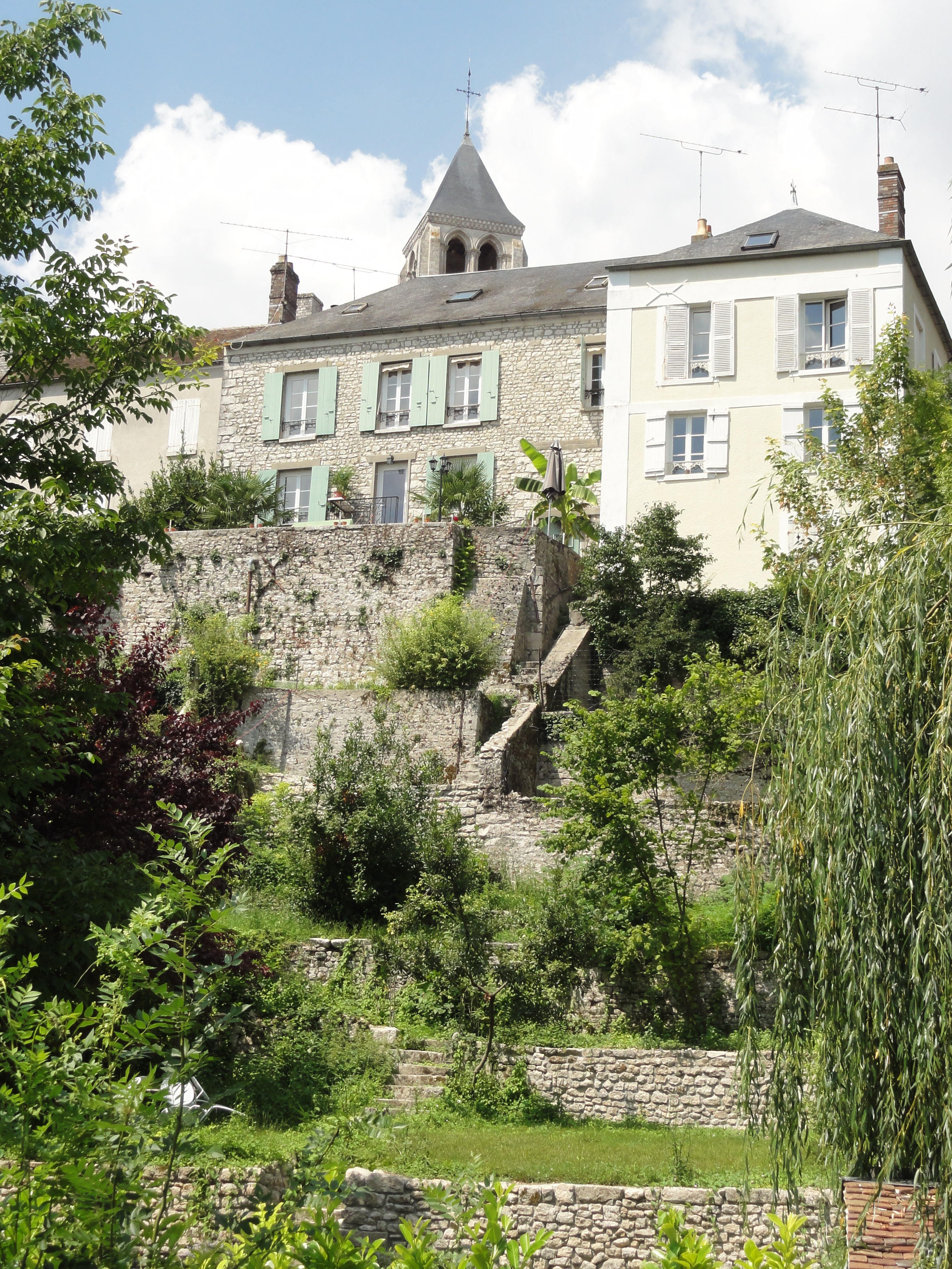 Maisons sur la rue de la Ville-Haute, depuis la rue du Bas-Larris.